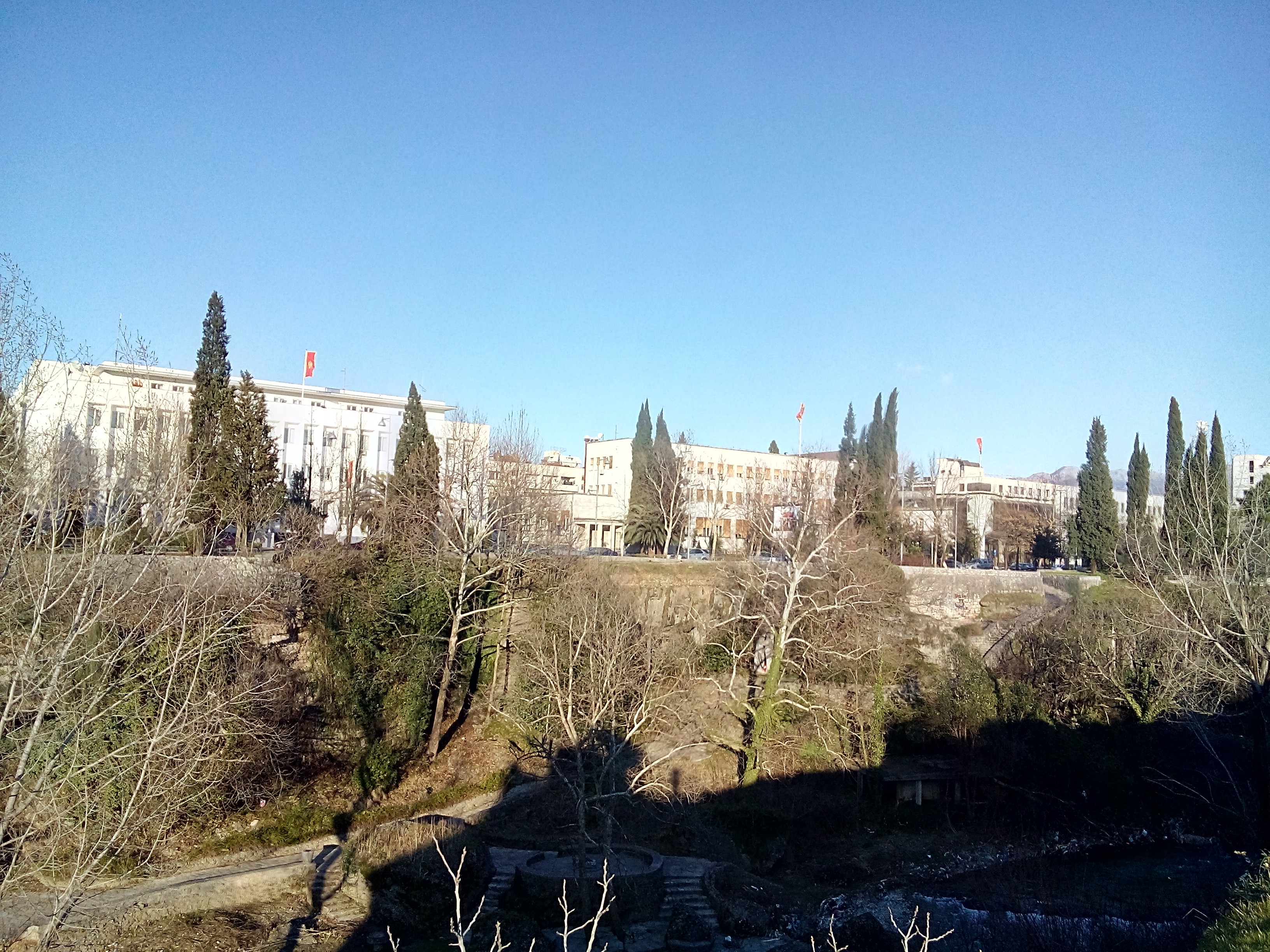 Подгорица, Черногория